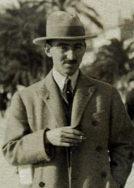 Məhəmməd Məhərrəmov. Fransa, 1920-ci illər